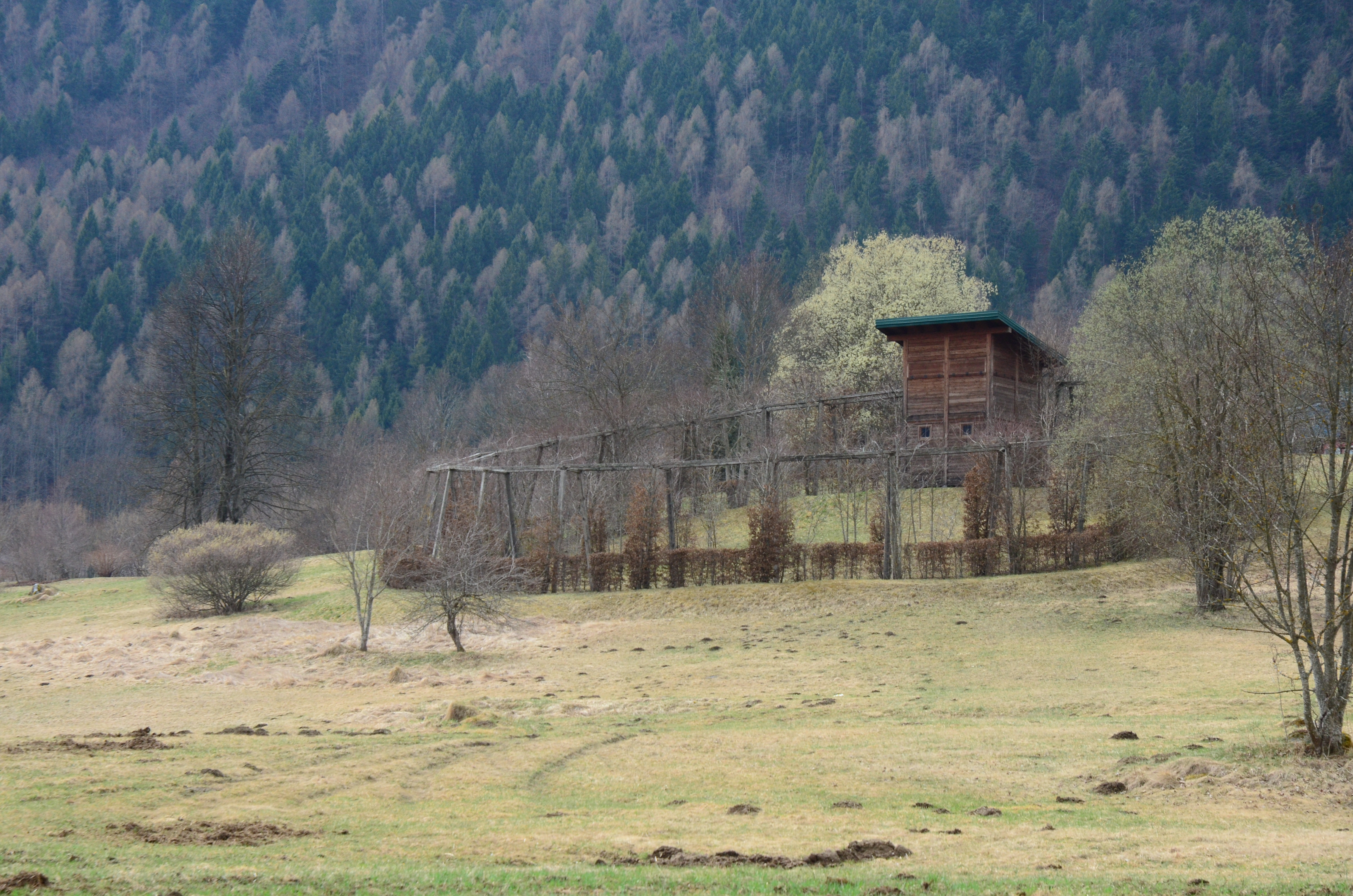 Rappresentazione del roccolo utilizzato per la cattura degli uccelli